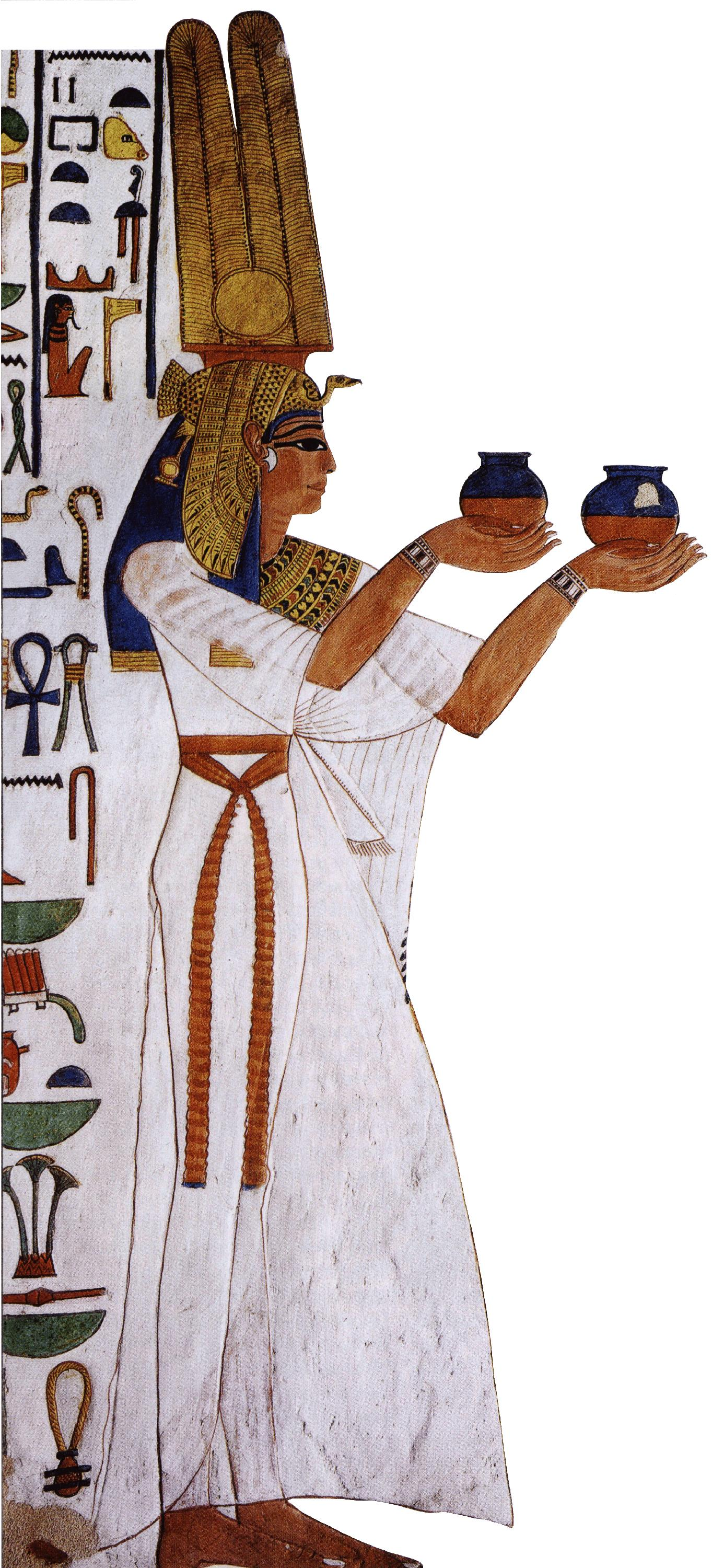 Représentation de Néfertari présentant des offrandes sur la paroi de son tombeau.